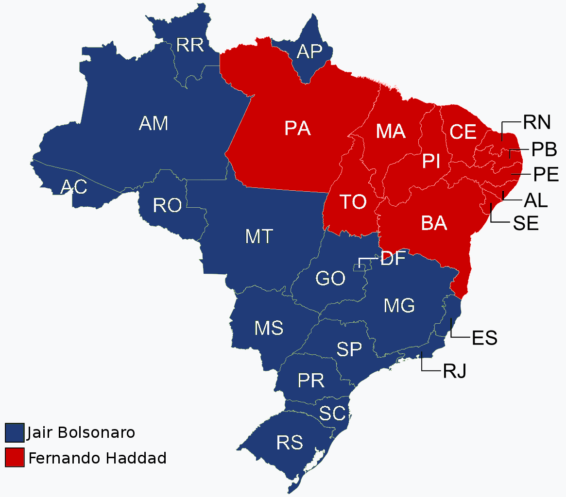 Second round of 2018 Brazil election